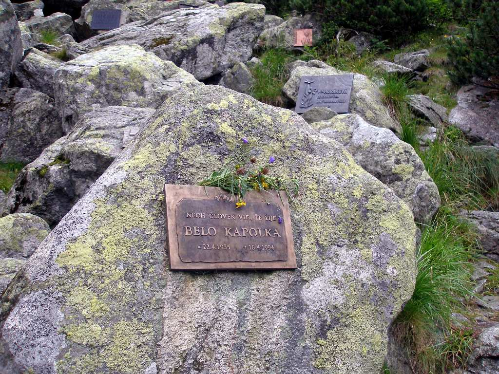 Tabule za kaplnkou na Symbolickom cintoríne pri Popradskom plese, Vysoké Tatry.